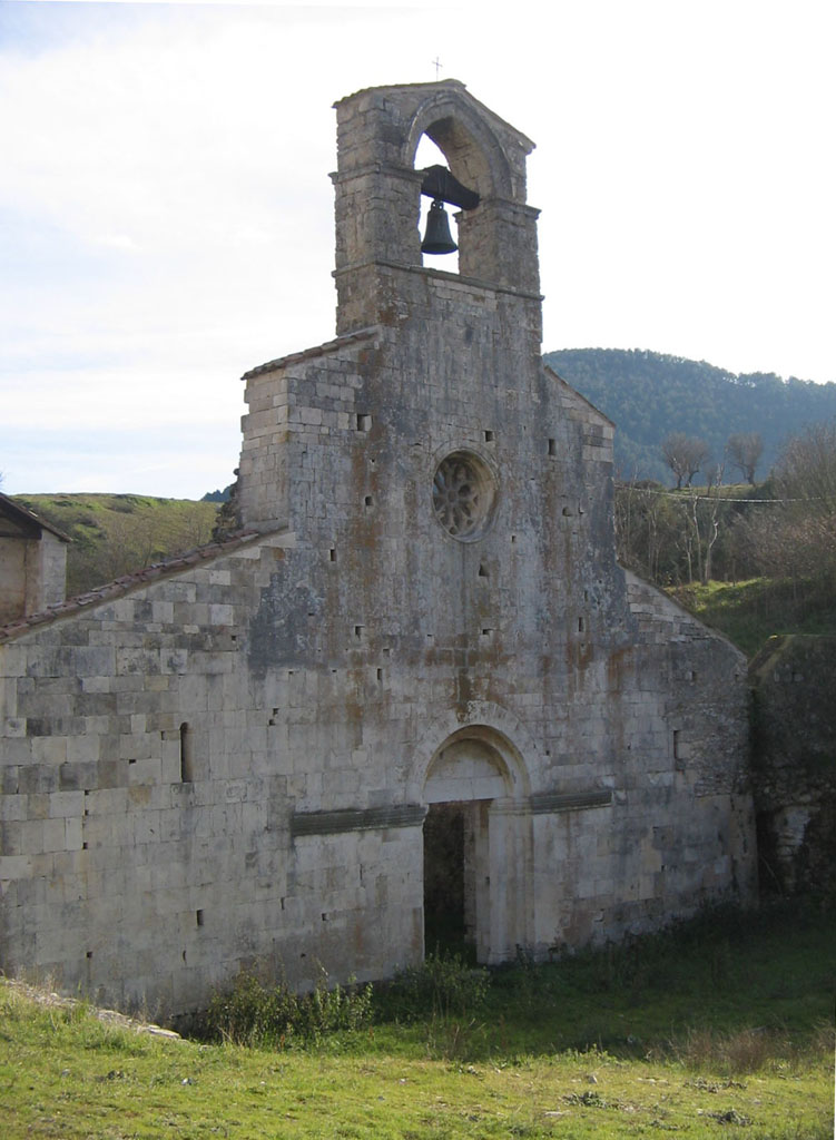 Tratturo Centurelle-Montesecco License on Flickr (2011-02-22): CC-BY-SA-2.0 Flickr tags: Abruzzo, Bussi sul Tirino, Tratturo Centurelle-Montesecco, transumanza